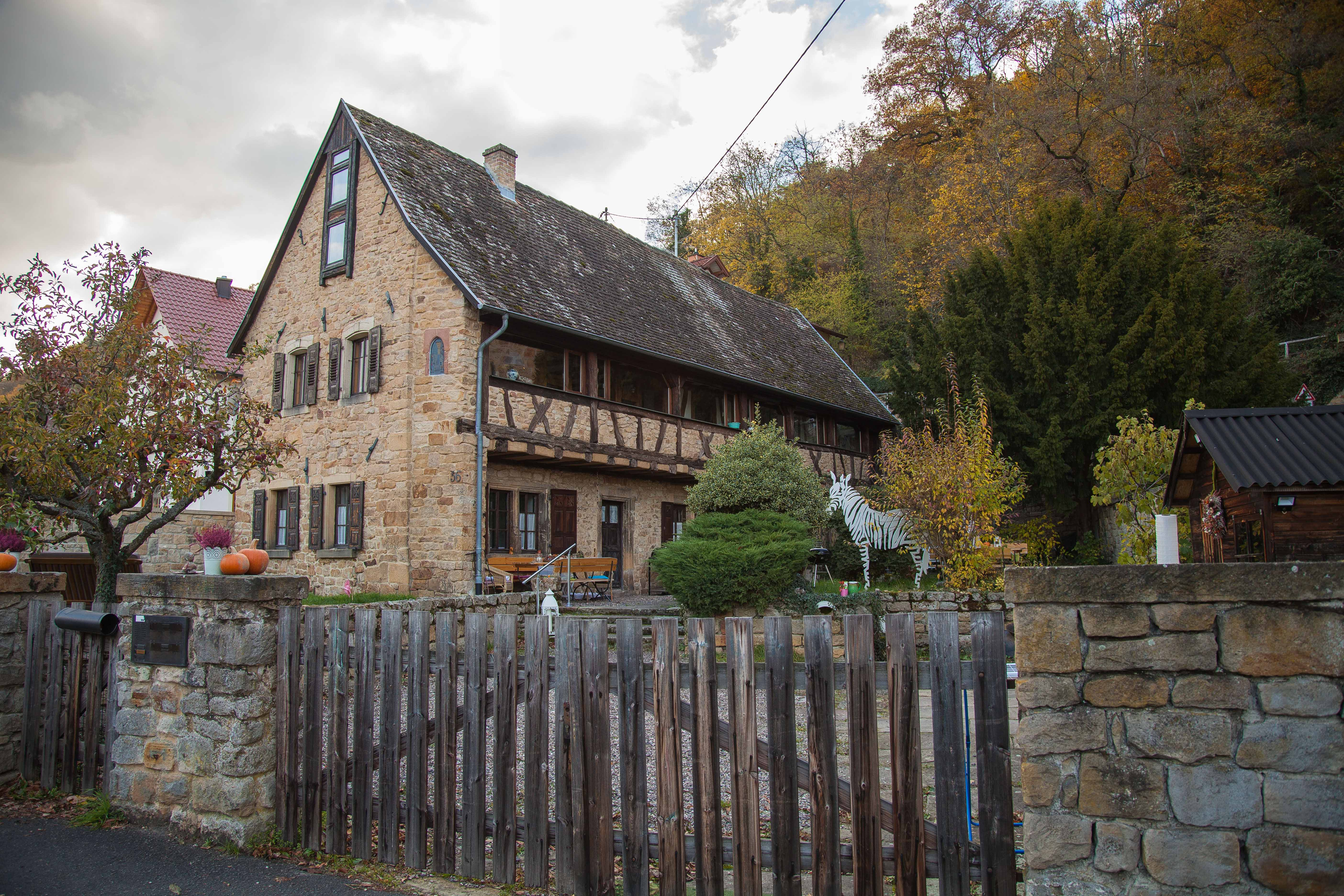 Ehemaliges Pfarrhaus, Bruchsteinbau mit Fachwerklaubengang